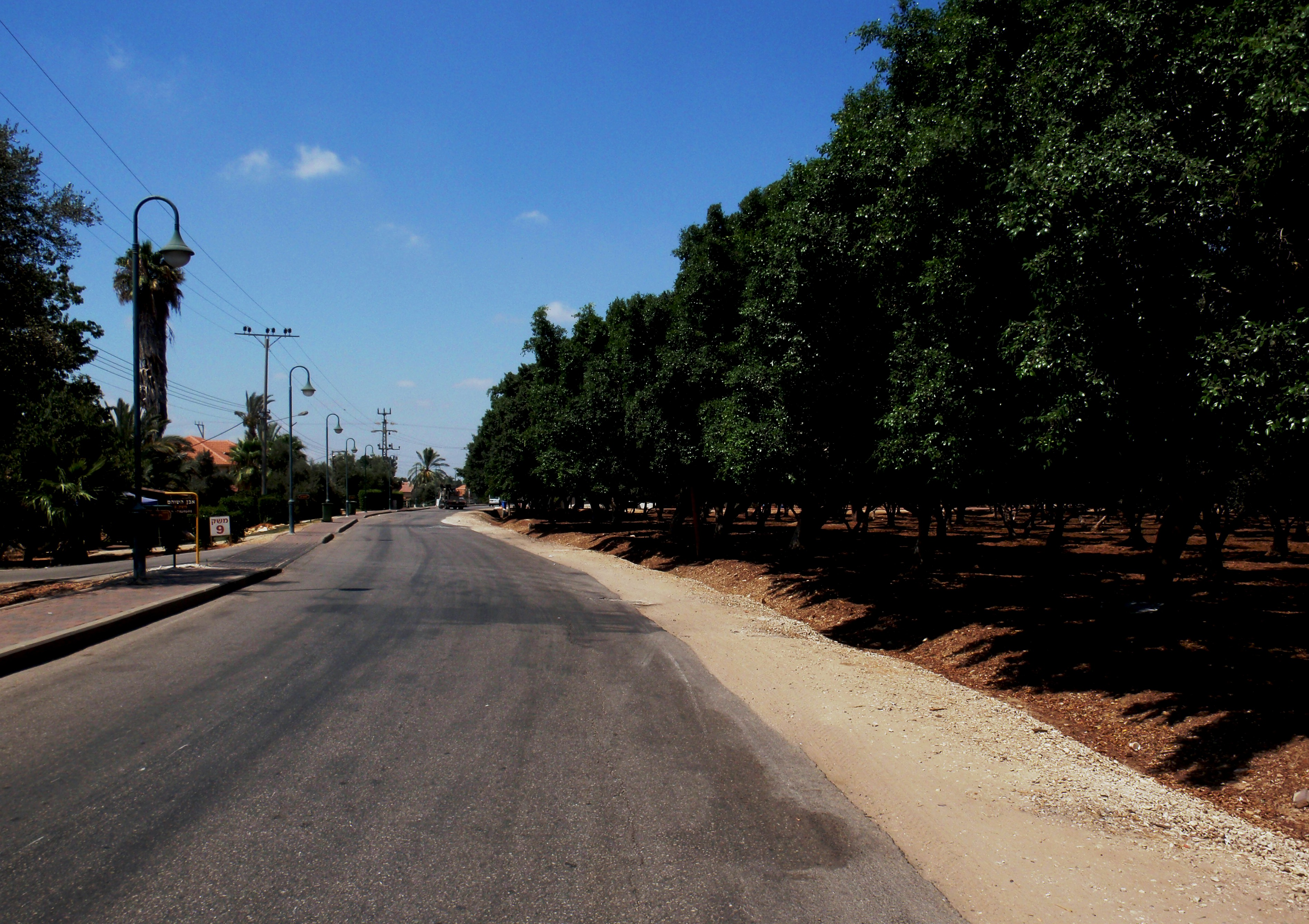 רחוב במושב ושדרת פיקוסים